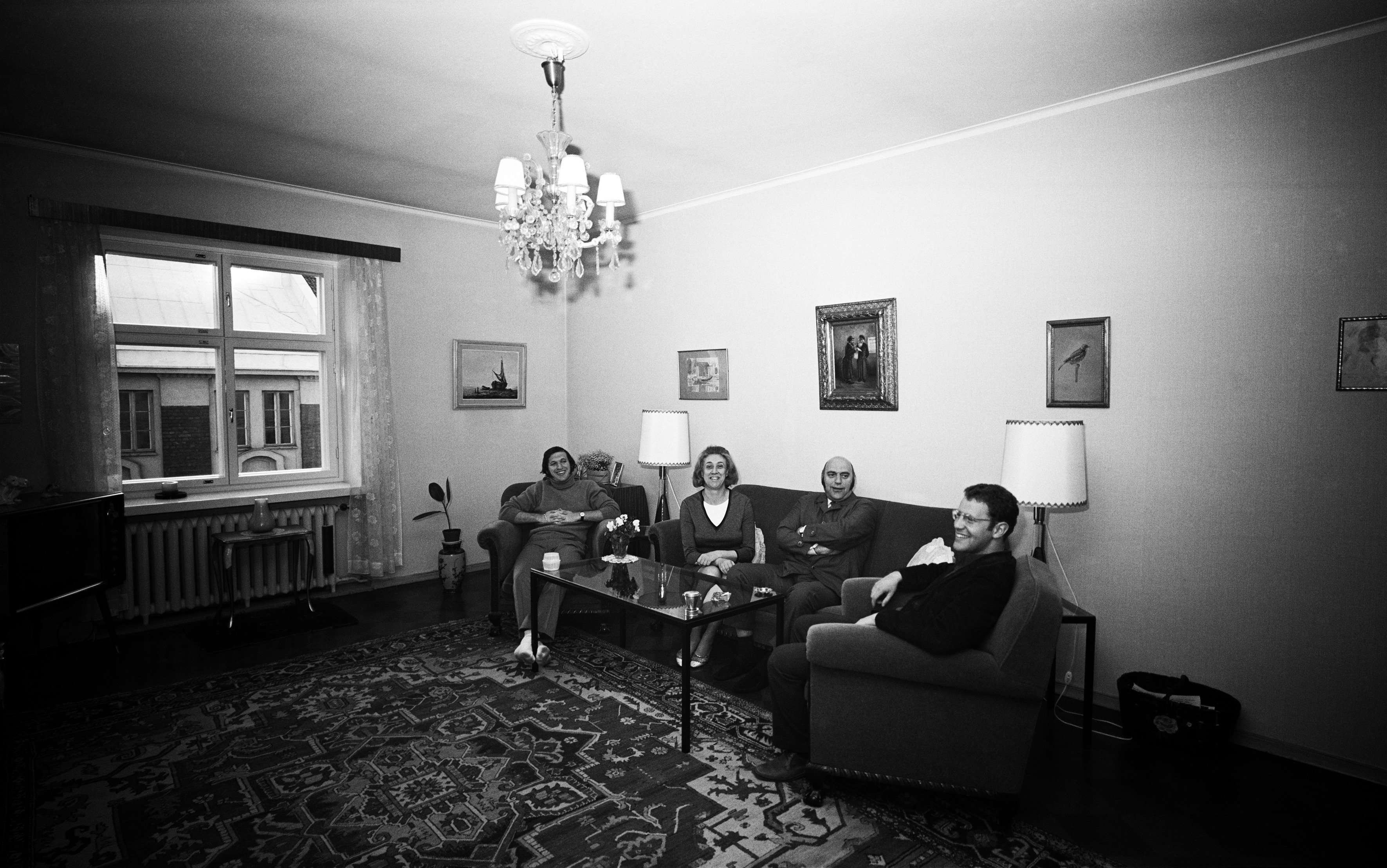 Insinööri Scholem Bolotowskin perhe olohuoneessaan. Museokatu 17 (Minervankatu 1 B).